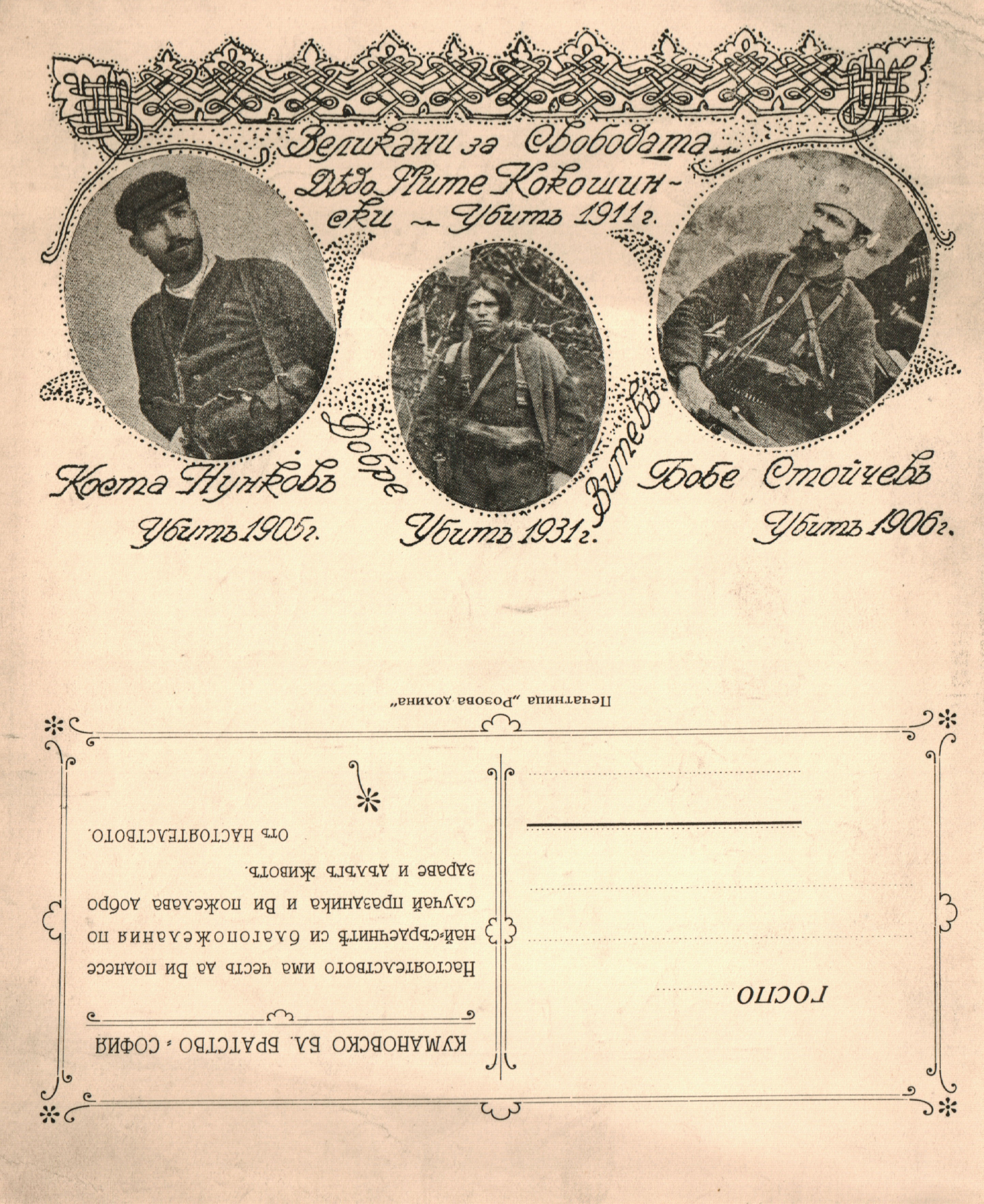 Илюстровани табла в памет на загинали дейци от Кумановско и Тиквешко, портрети на Коста Нунков, Добре Витев и Бобе Стойчев.